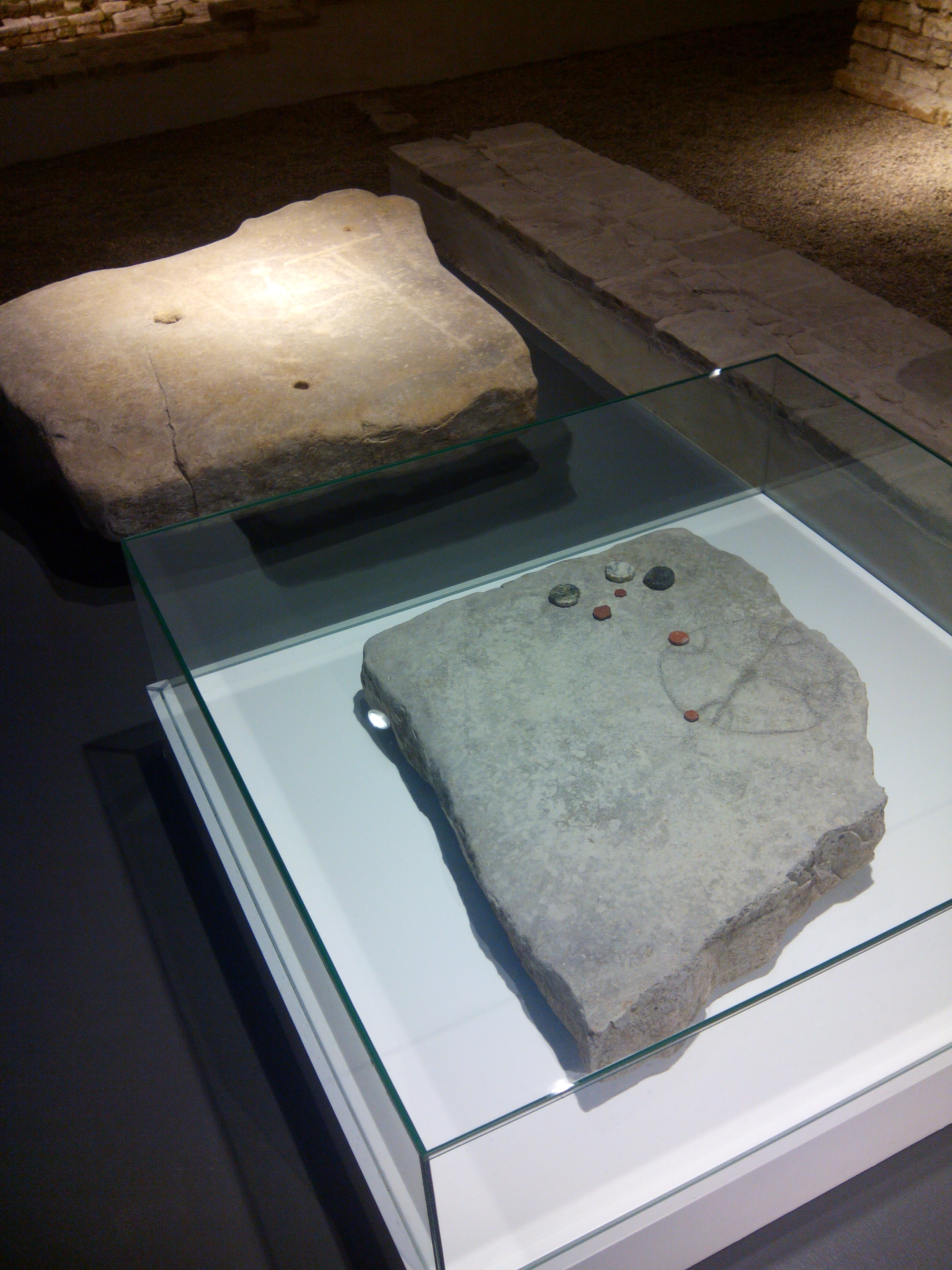 "El solar de La Encarnación fue atravesado en época romana por una gran calle de 6 m de anchura que corría Este-Oeste, dirigiéndose hacia la actual calle José Gestoso. El pavimento fue de losas de piedra en un principio (s. I ) reparándose en diversos momentos con tierra, cascotes, etc. hasta el s. VI. En varias losas se identificaron tablas de juego –tabulae lusoriae- incisas en la piedra, muy populares en la época. Las más abundantes son las circulares con cruz inscrita, un juego similar al “tres en raya”. En las losas aparece frecuentemente más de un tablero, a veces superpuestos, por lo que el esquema seleccionado sería tiznado para jugar. Las fichas circulares, como las que aparecen en la imagen, se fabricaban con trozos de vasos de cerámica, placas de mármol, etc." (Sacado de la webː